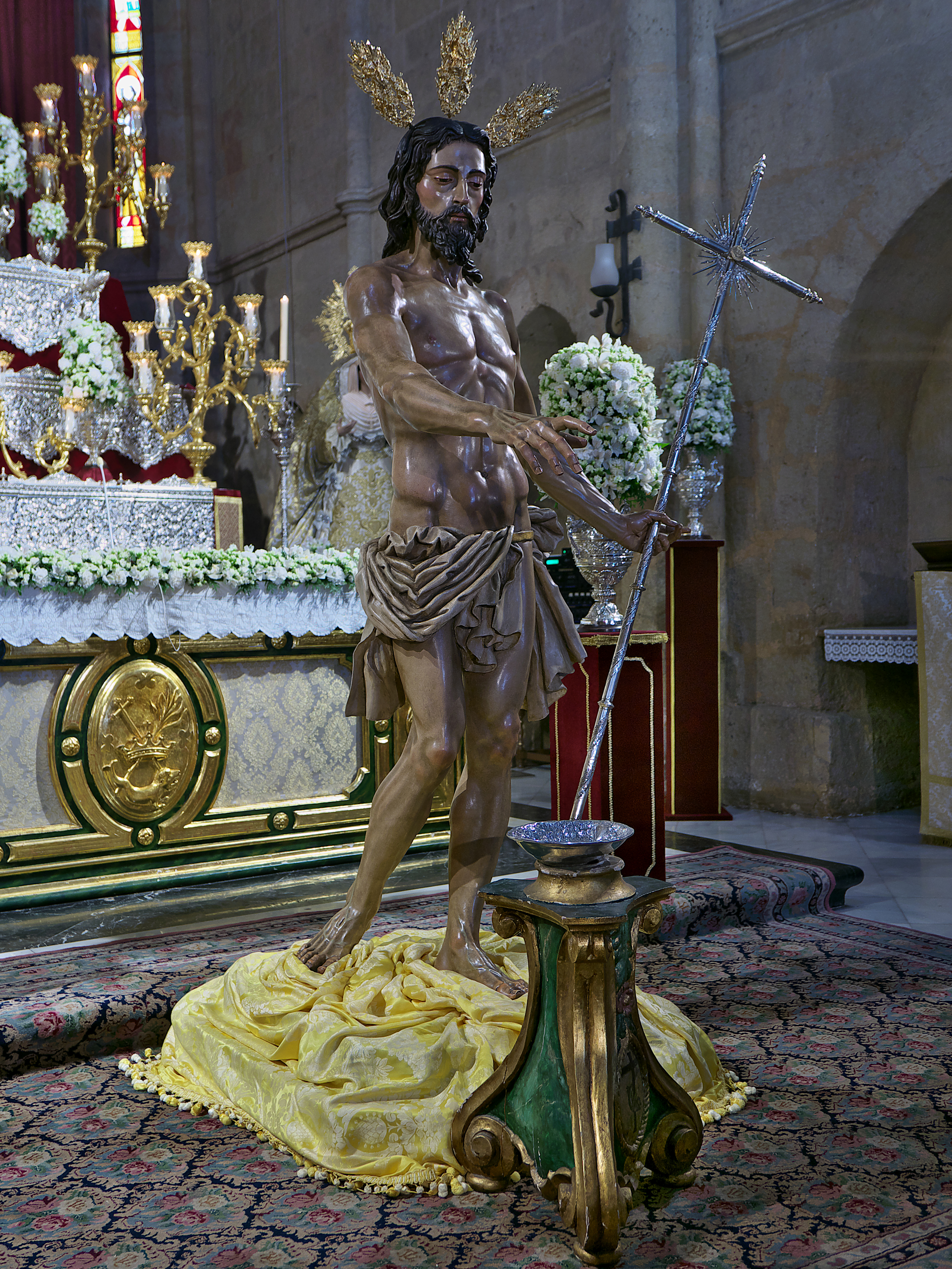 Imagen titular de la Real e Ilustre Hermandad de Nuestro Señor Resucitado y María Santísima de Nuestra Alegría (Iglesia de Santa Marina de Aguas Santas, Córdoba). Tallada por Juan Manuel Miñarro López (1988)